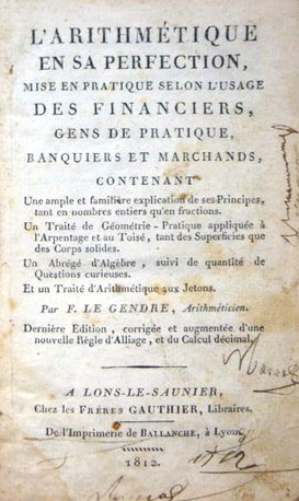 Couverture de la version de 1812, dernière publication de l'Arithmétique en sa perfection